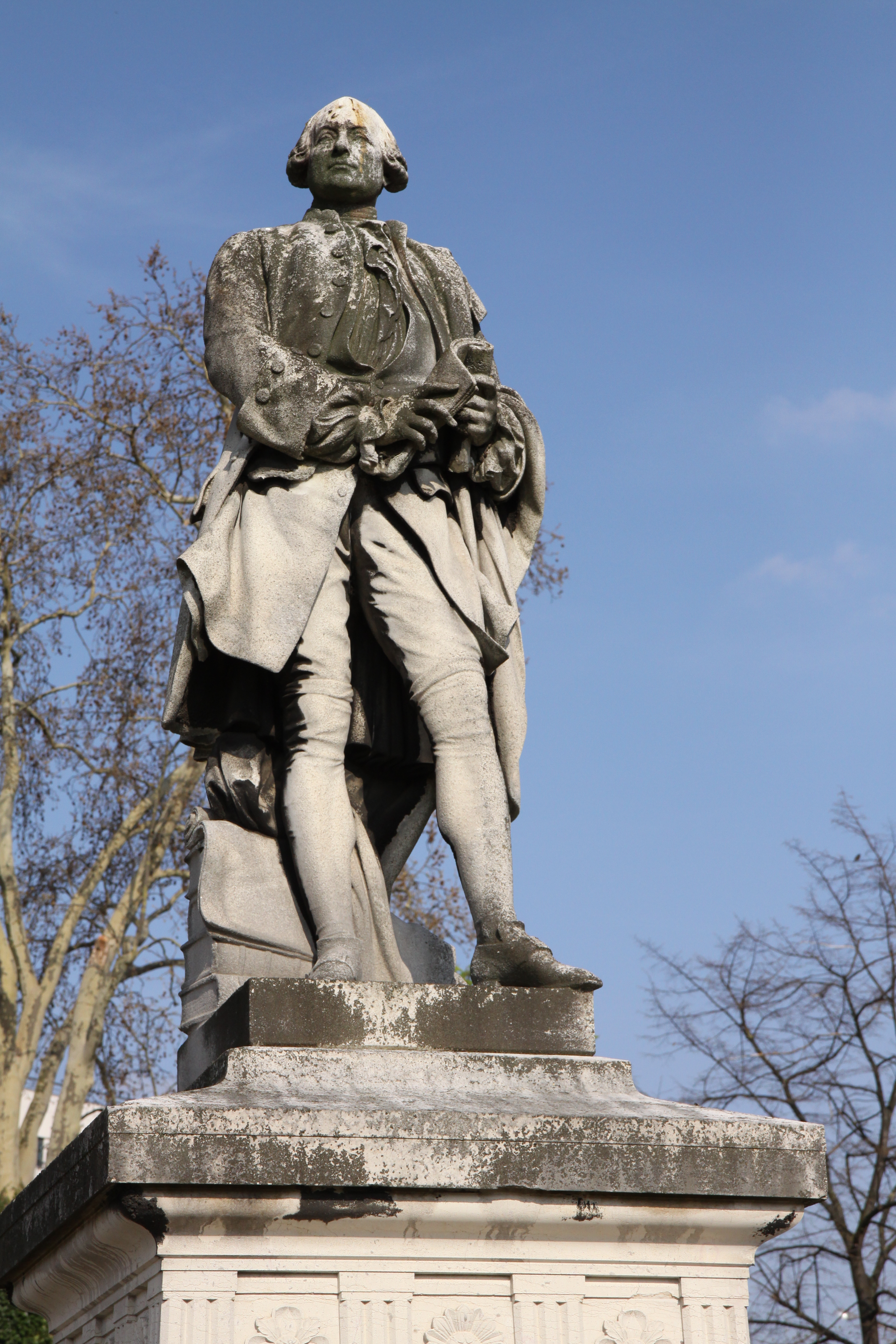 . Statue de Claude Bourgelat à l'entrée de l'école vétérinaire d'Alfort.